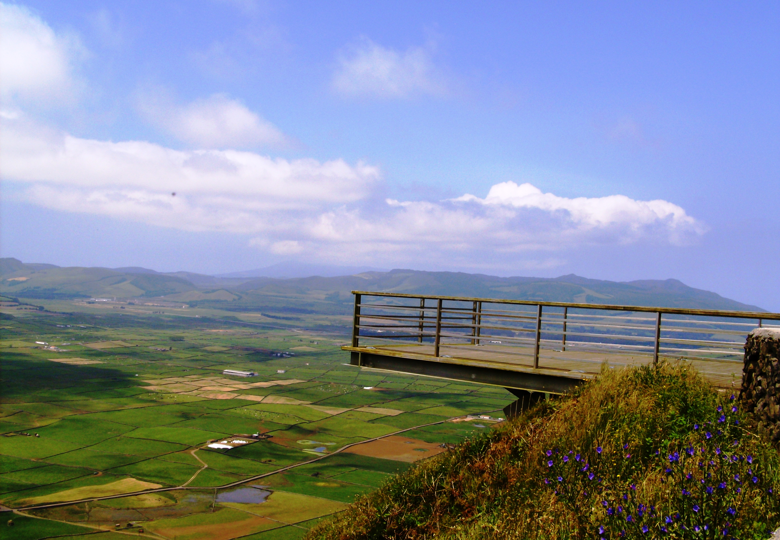 Miradouros da Serra do Cume, Praia da Vitória, ilha Terceira, Açores: planície interior da ilha.